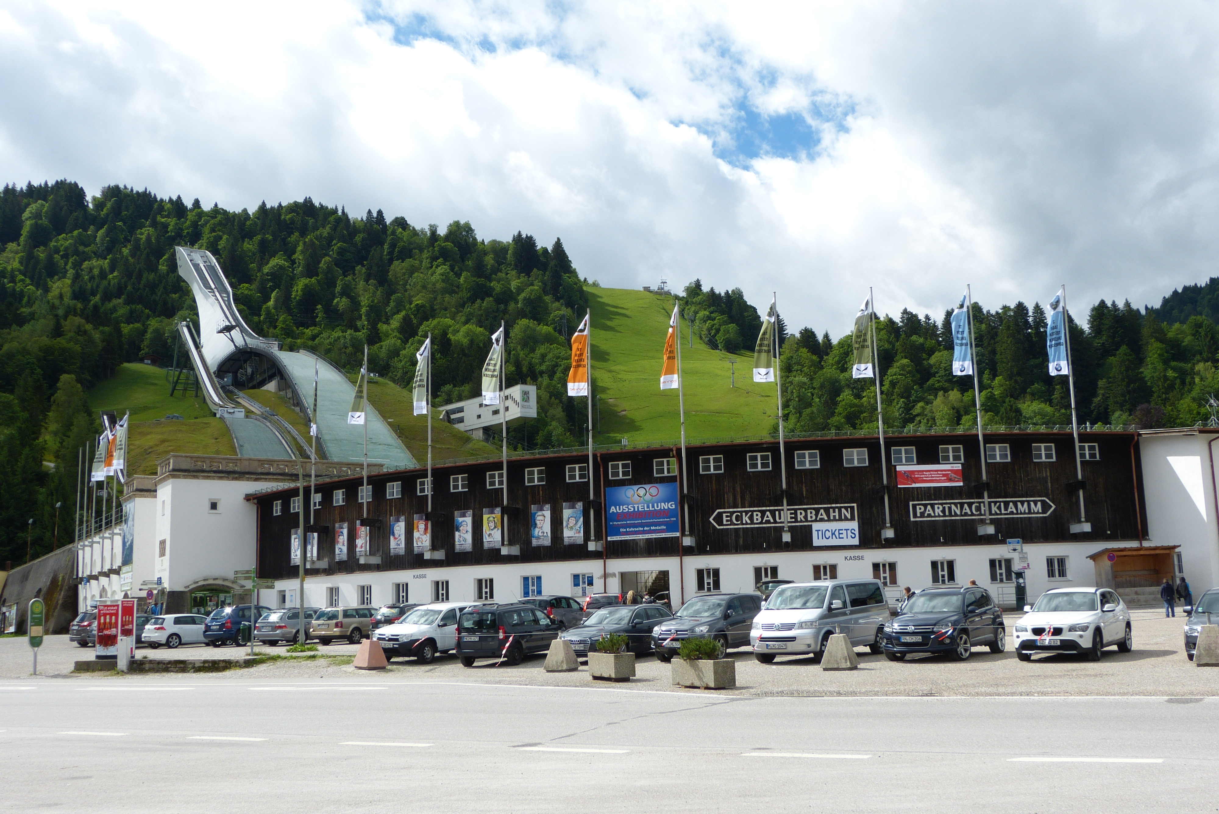 Garmisch-Partenkirchen, Olympia-Skistadion, von außen (Kulturdenkmal D-1-80-117-110)